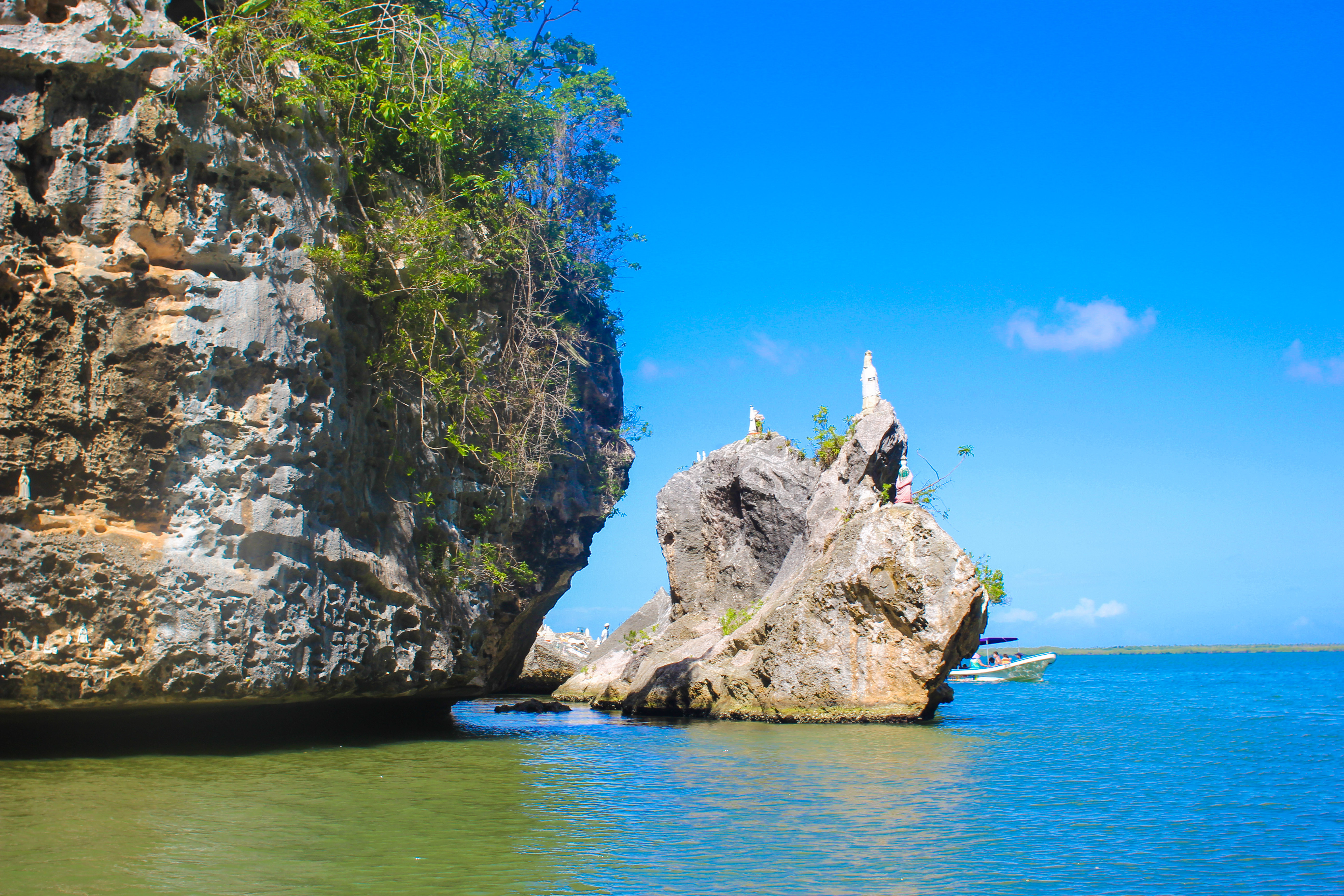 Chichiriviche, Edo. Falcón